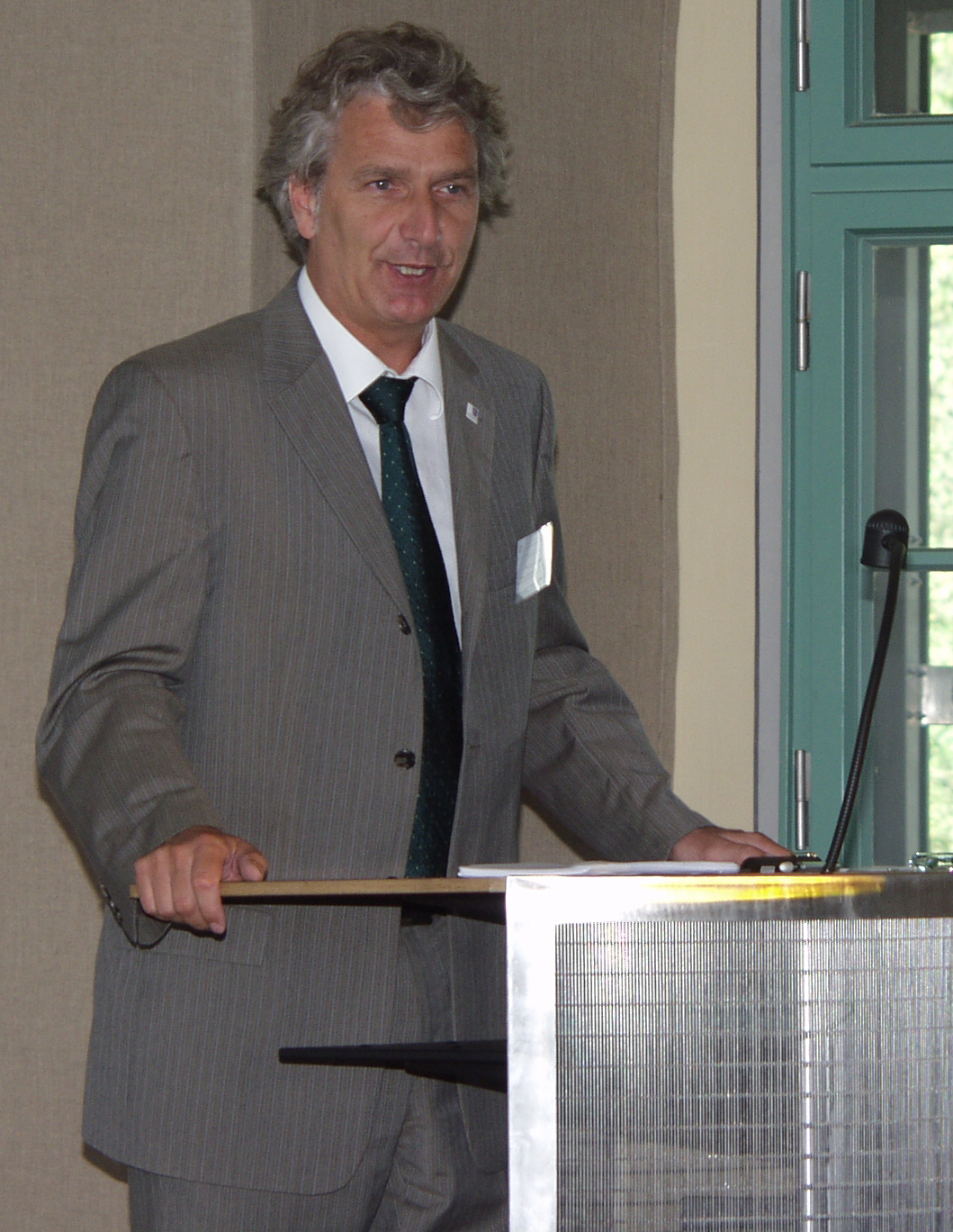 Christian Juckenack, damals Staatssekretär im Ministerium für Wirtschaft, Technologie und Arbeit (Thüringen/Deutschland), im Juli 2006 als Referent auf einer Fachveranstaltung zu Energiepflanzen in Dornburg an der Thüringer Landesanstalt für Landwirtschaft